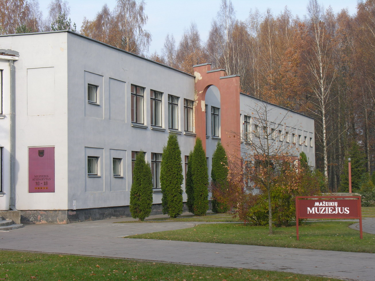 Mažeikių muziejus Foto: Algirdas, 2005 m. lapkričio 3 d.